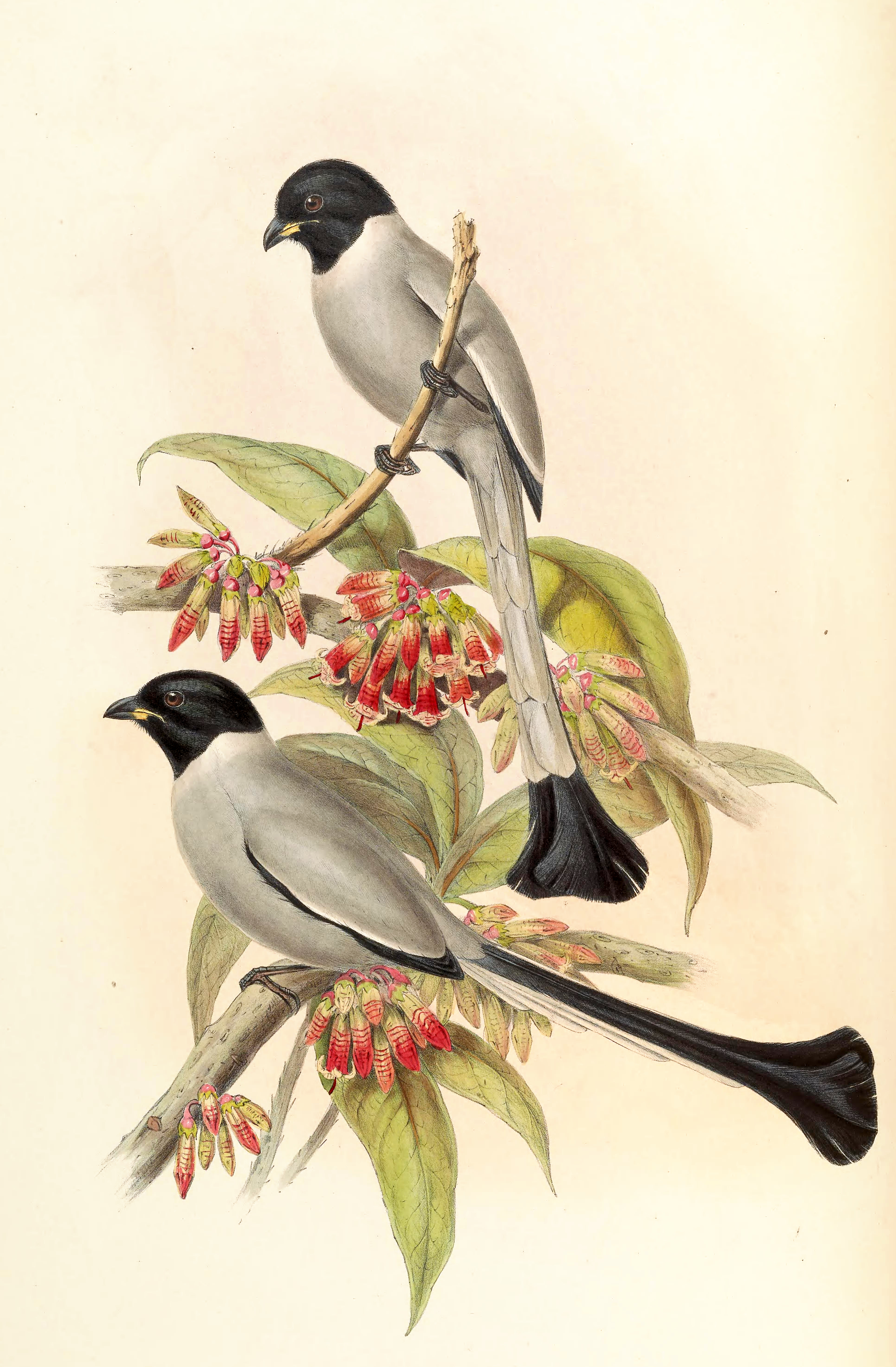 Spatelschwanzelster (Crypsirina cucullata), Lithografie von John Gould (The Birds of Asia)